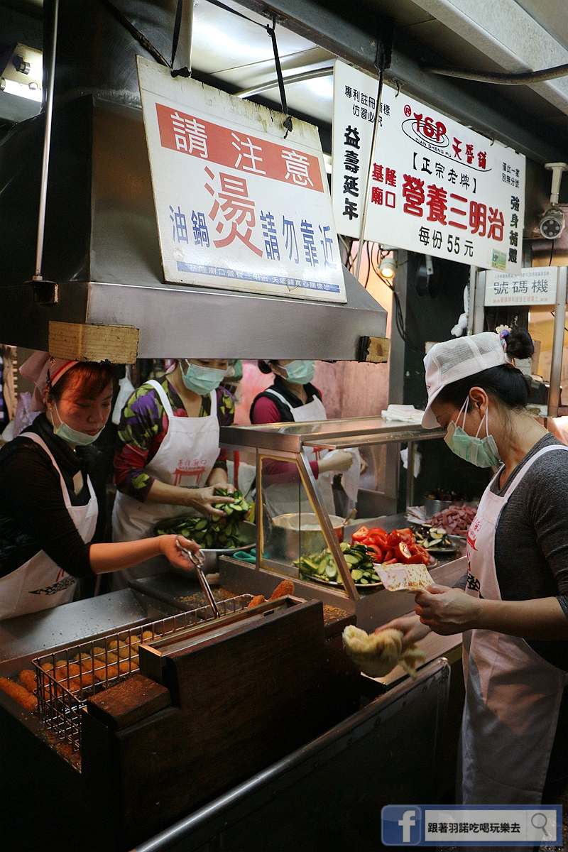 天盛鋪營養三明治，位於基隆市廟口夜市58號攤。